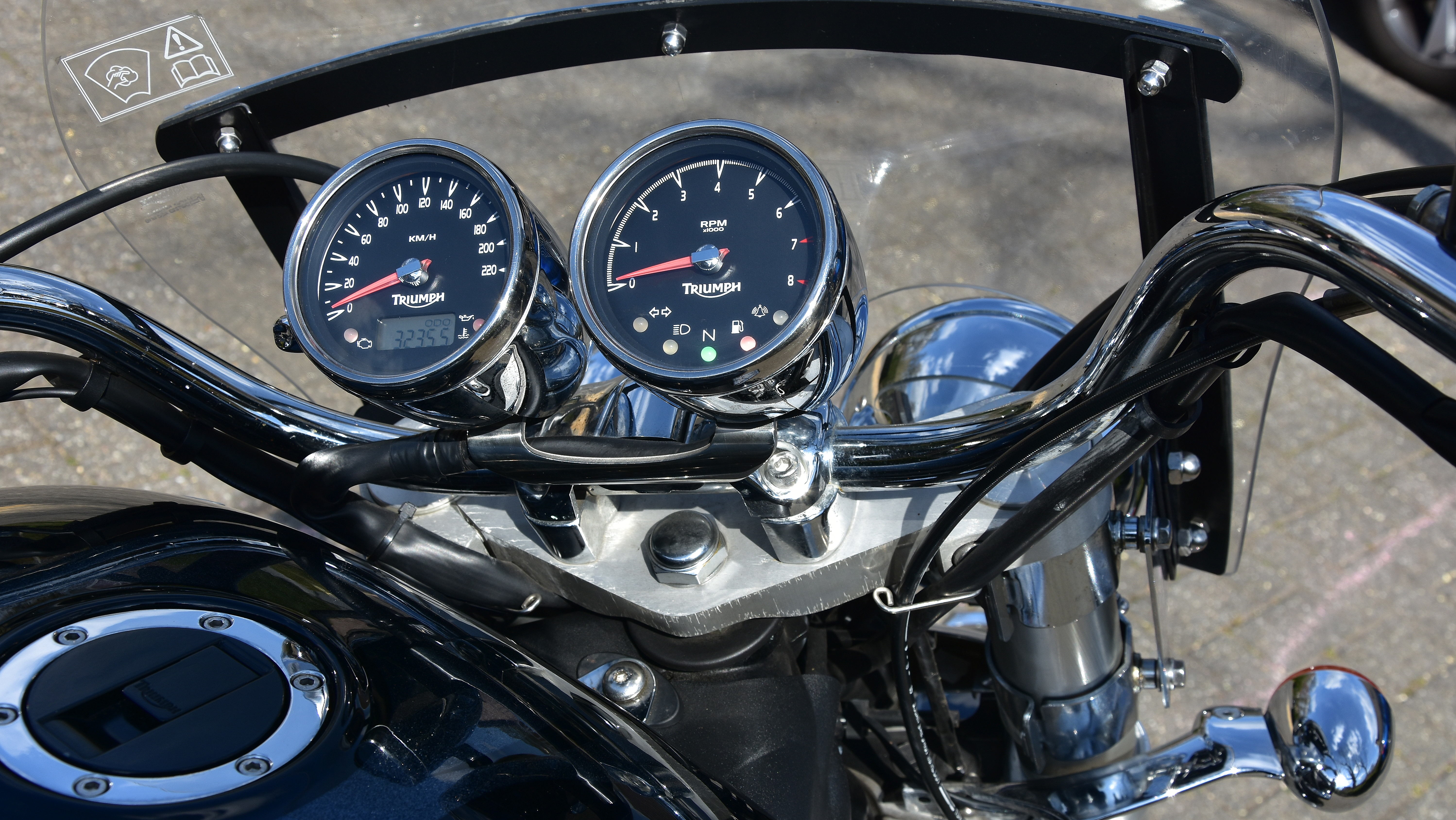 Triumph Rocket III 5-04-2020 13-48-04